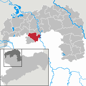 Jesewitz in Saxony - Landkreis Nordsachsen